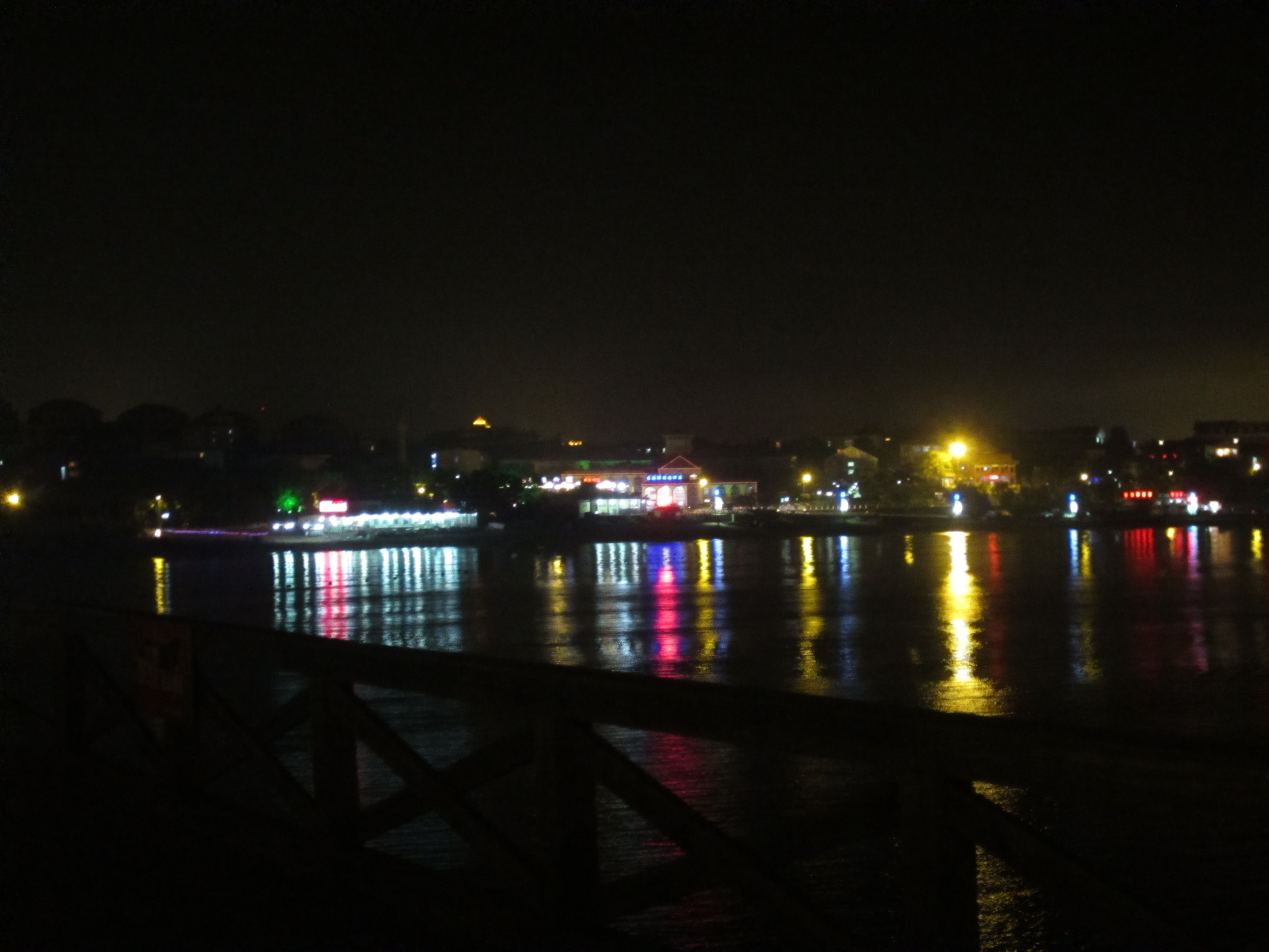 Бэйдайхэ ночью